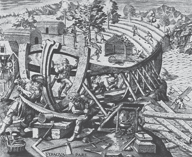 Lope Olanok karabela bat eginarazten du